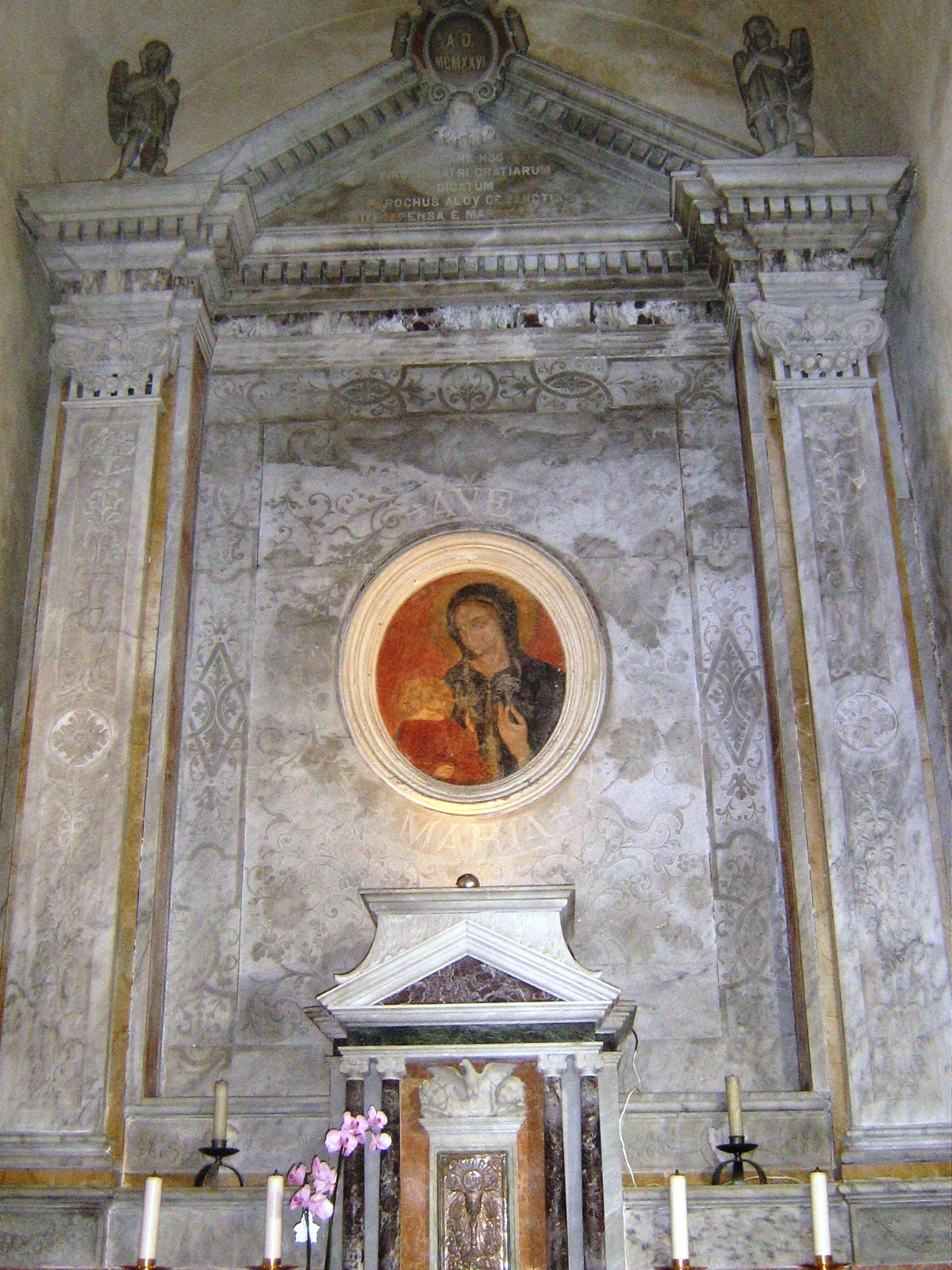 Lecce Santa Maria della Grazia